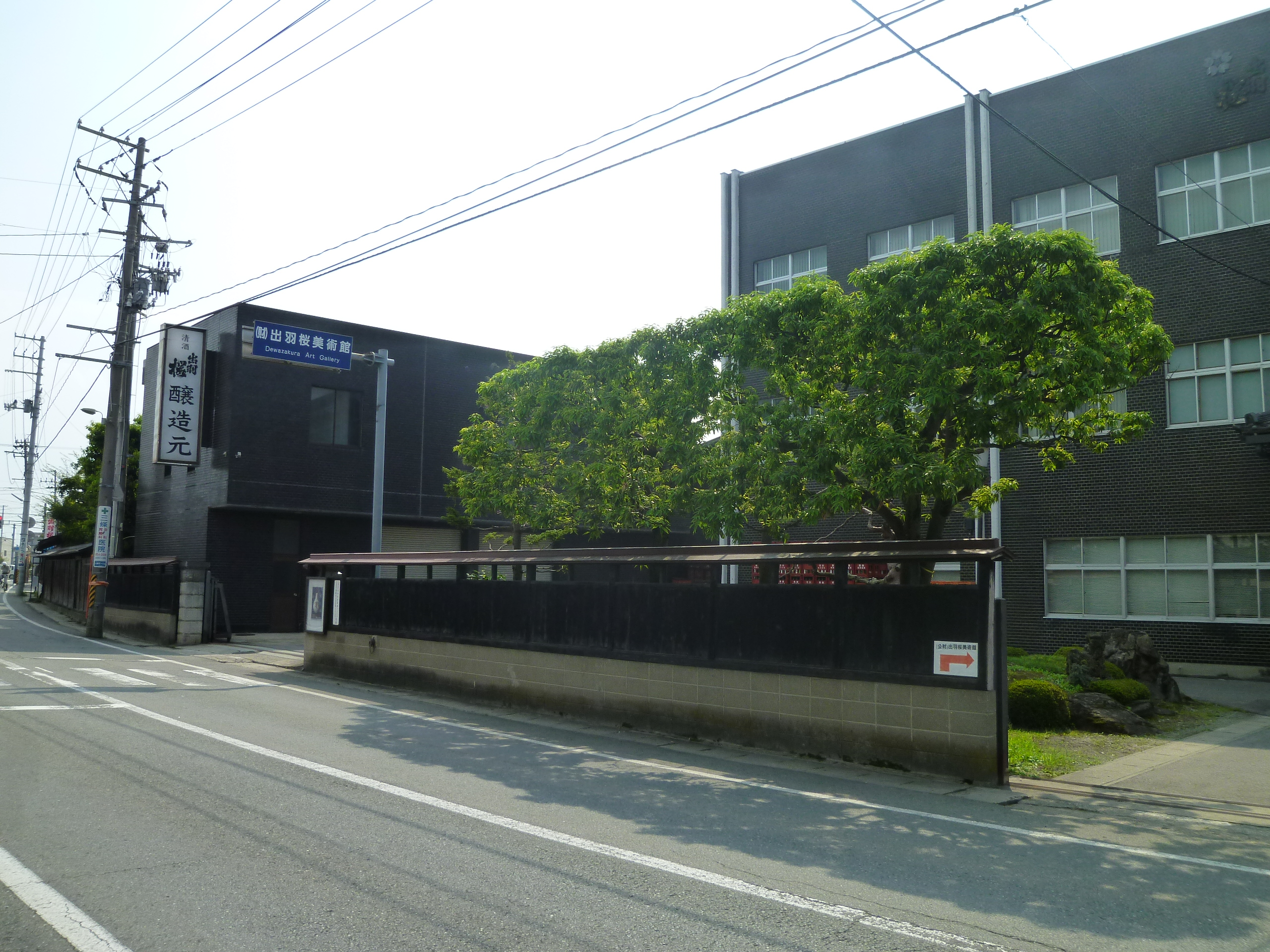 出羽桜酒造醸造所。山形県天童市一日町に所在。 出羽桜美術館を併設。